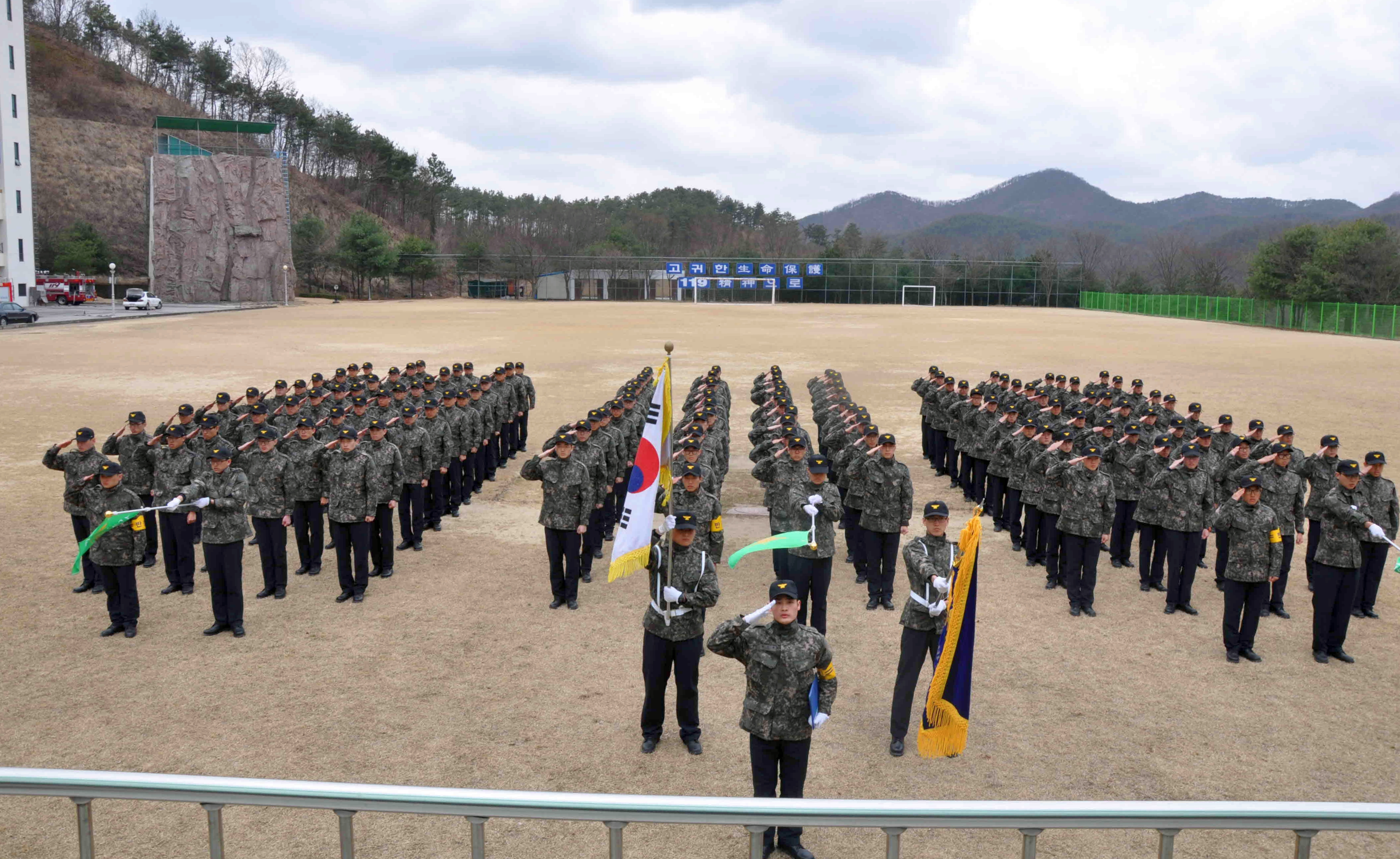 경기도소방학교 제36기 의무소방원 소방실무과정 입교식